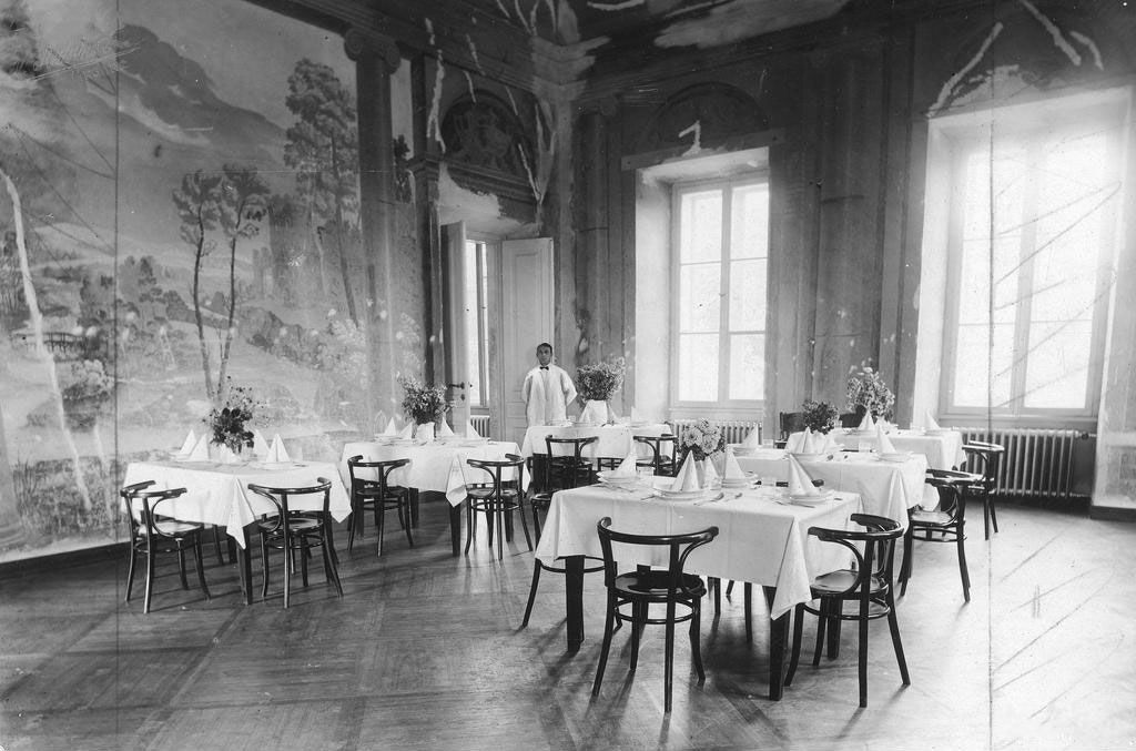 Беларуская (тарашкевіца): Сьвяцак (Śviacak), палац Валовічаў (Vałovič)